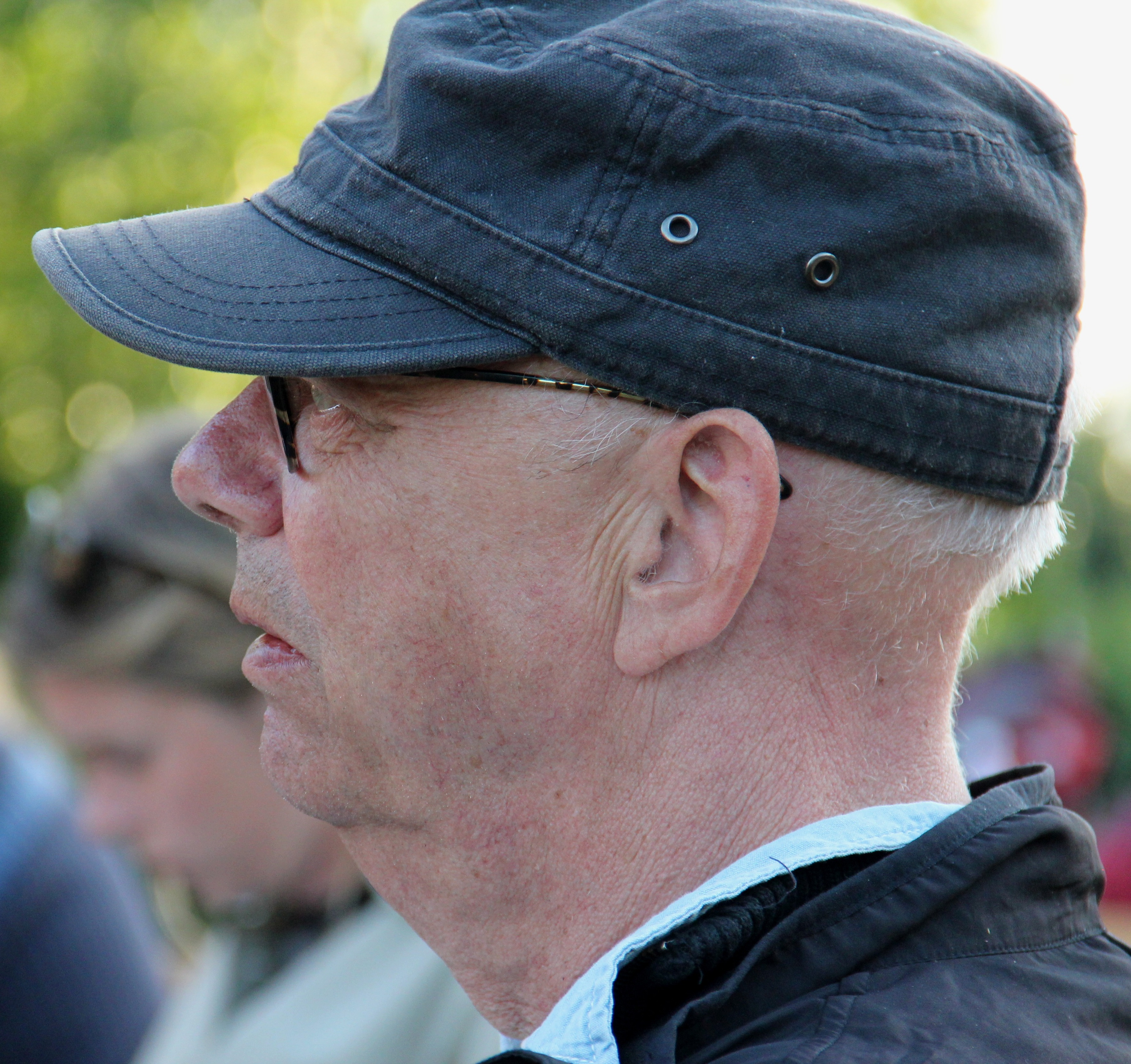 Novelist Erling Jepsen